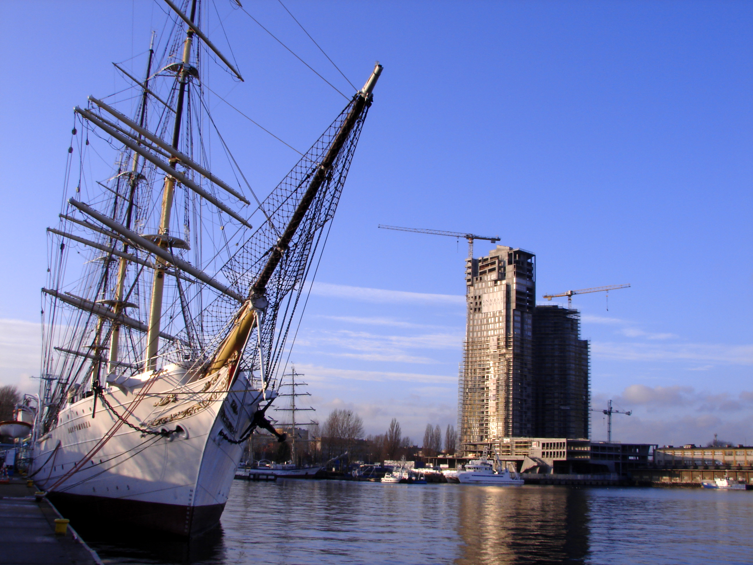 Sea Towers, Gdynia, Poland